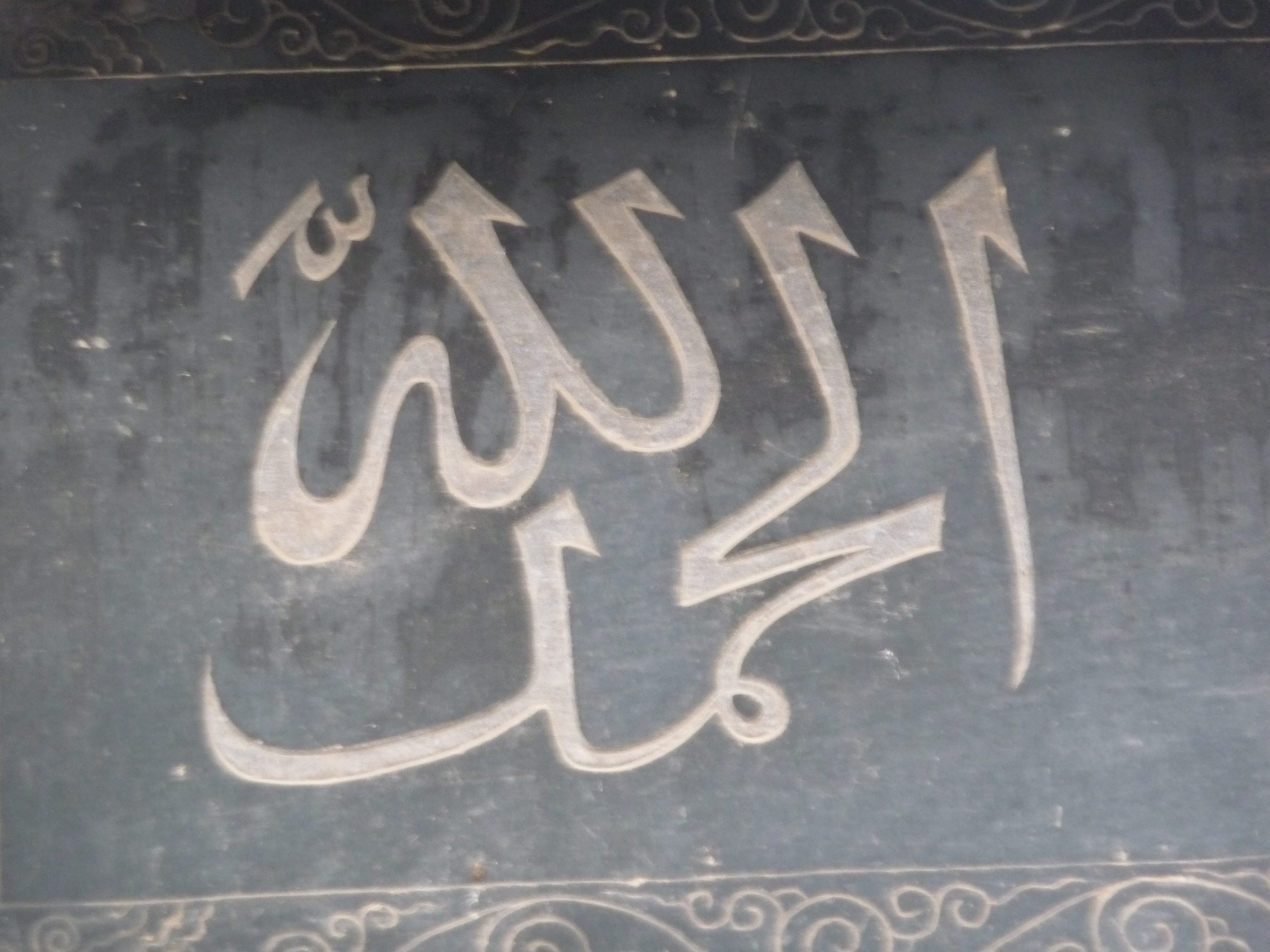 Große Moschee von Xi'an